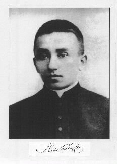 P. Josef Pozbyl, první farář ve Vidči (valašské Meziříčí